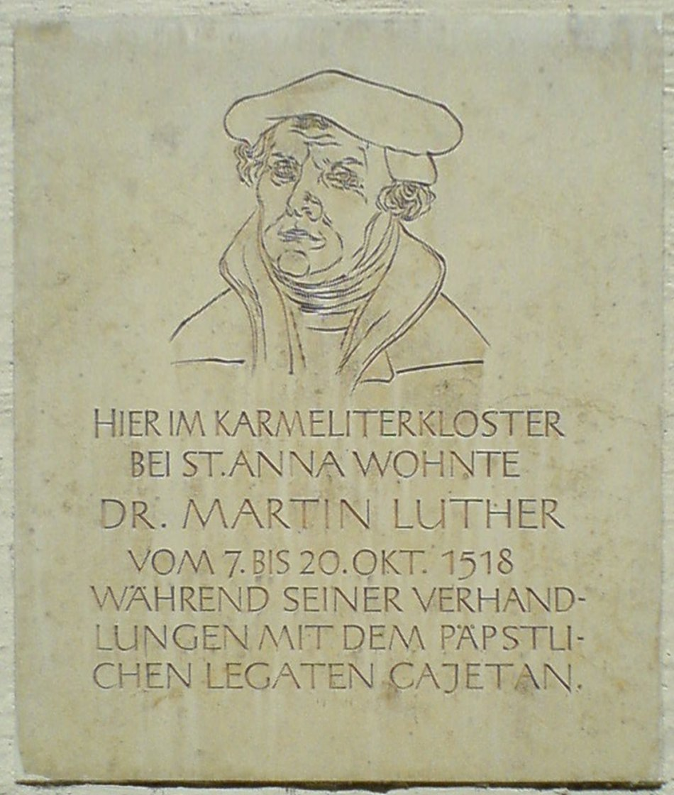 St.-Anna-Kirche in Augsburg, Luthergedenktafel.